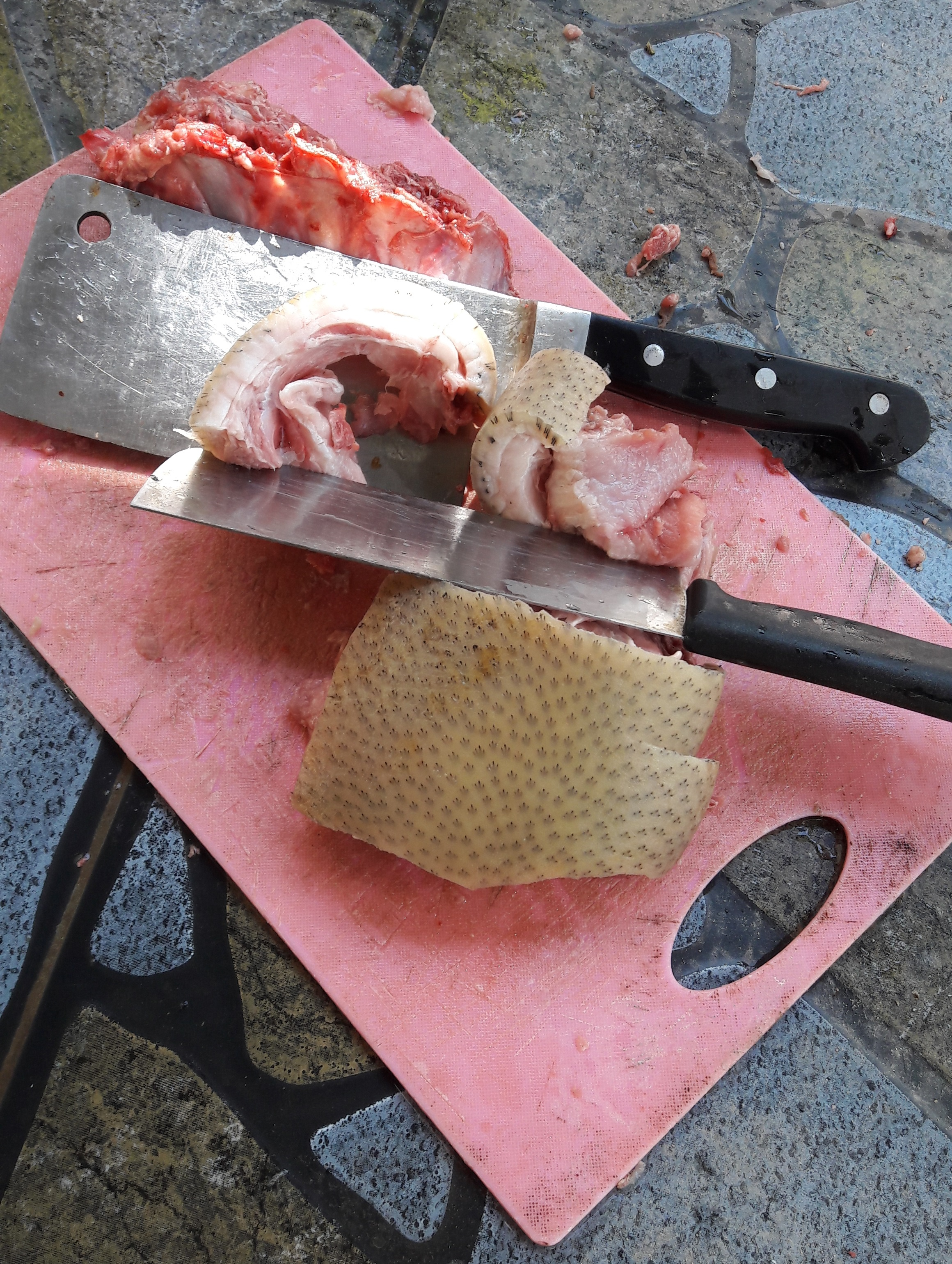 Hình tự chụp bằng máy ảnh cá nhân về thịt của một con heo rừng Việt Nam bắn được ở Hướng Hóa, heo rừng thật thì da của chúng ở mỗi lỗ chân lông mọc ra ba sợi lông, trong khi heo nhà chỉ mọc ra một sợi